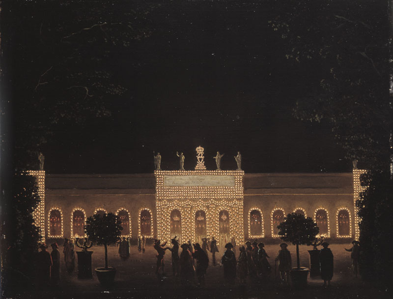 Orangeriet i Kungsträdgården (Vauxhallen) illuminerad vid Borgerskapets fest den 21 augusti 1791 med anledning av Gustav III:s hemkomst från Aachen Teknik: Olja. Bas: Duk. Mått i mm 455X590.